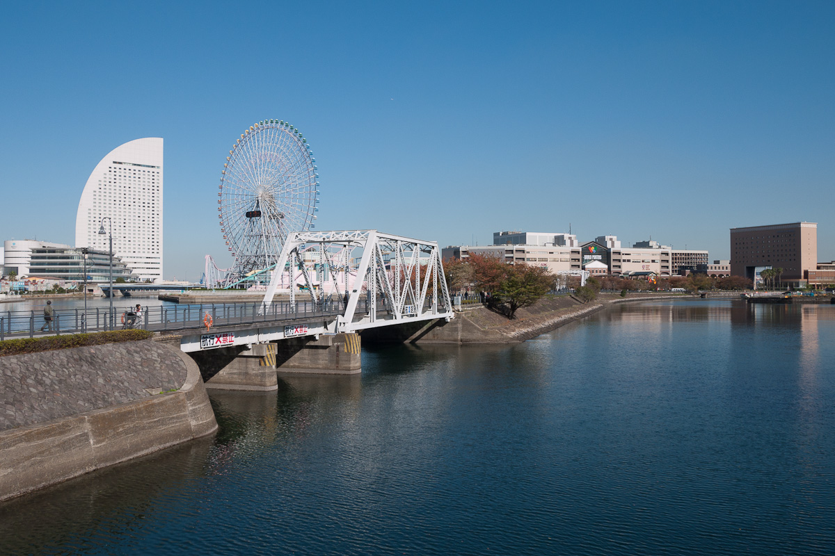 「汽車道」と港1号橋梁、横浜市中区新港2丁目。